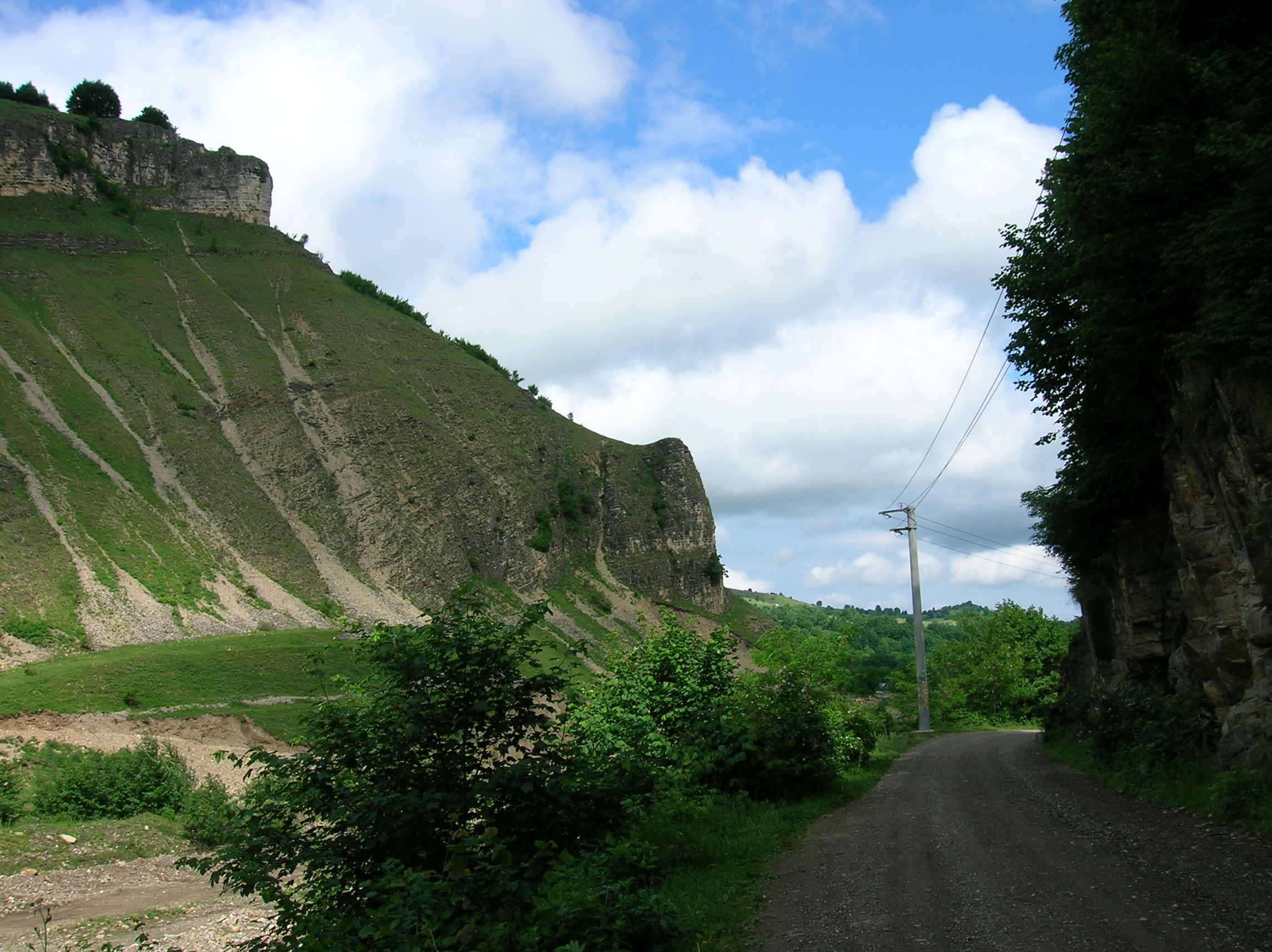 Munţii Tarcăului (Carpaţii Orientali, România)- Piatra Şoimului (Valea Calului, Comuna Piatra Şoimului)